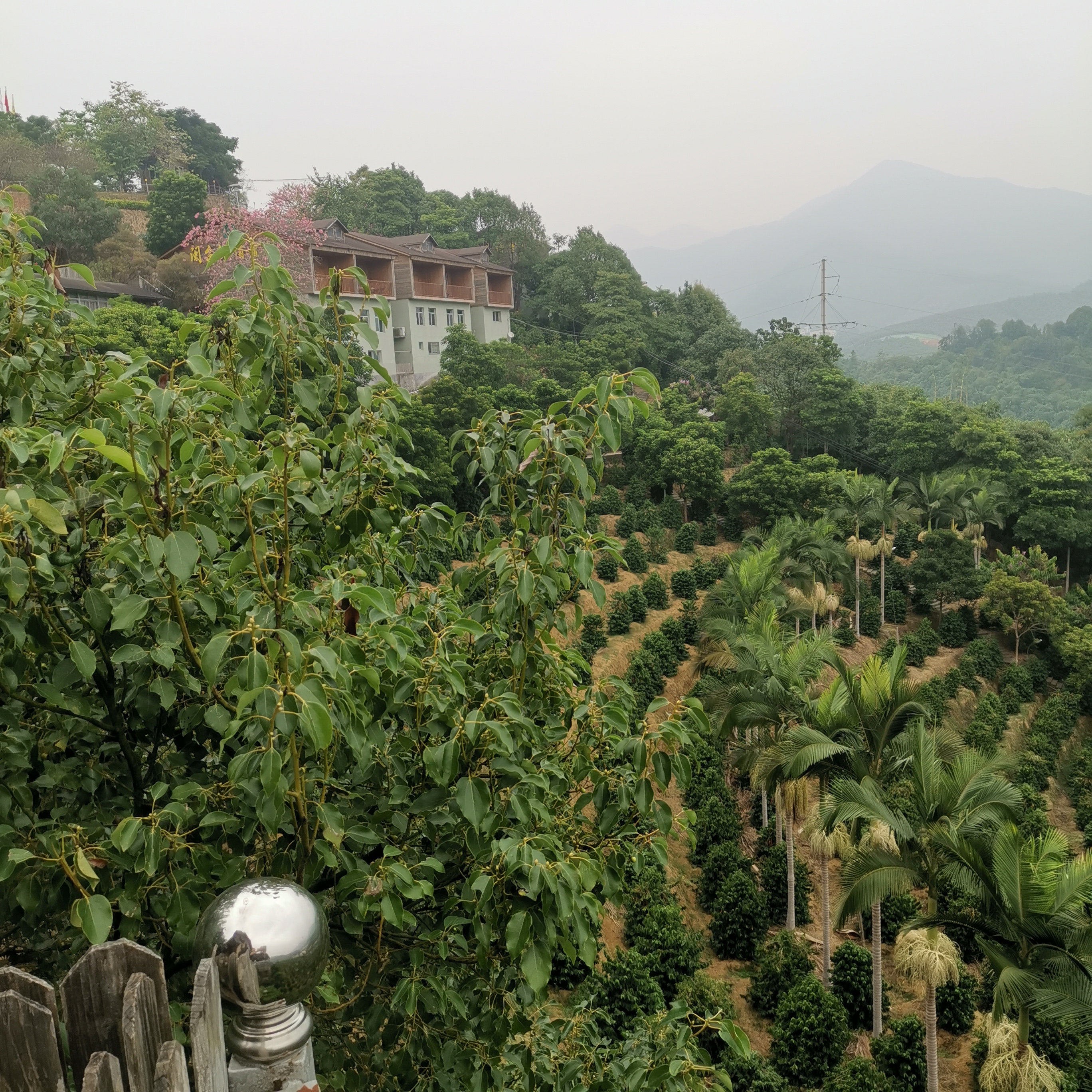 中文（中国大陆）: 南靖南坑咖啡园